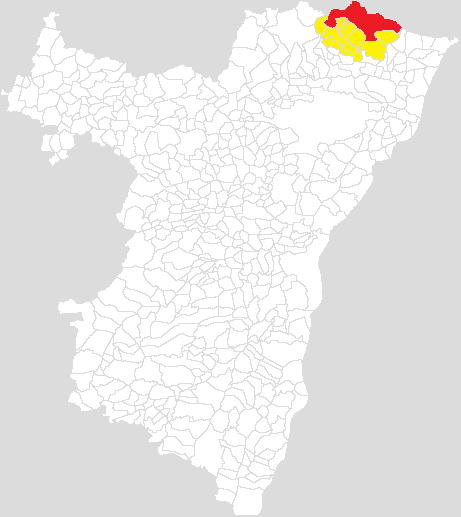 Communauté de communes du Pays de Wissembourg